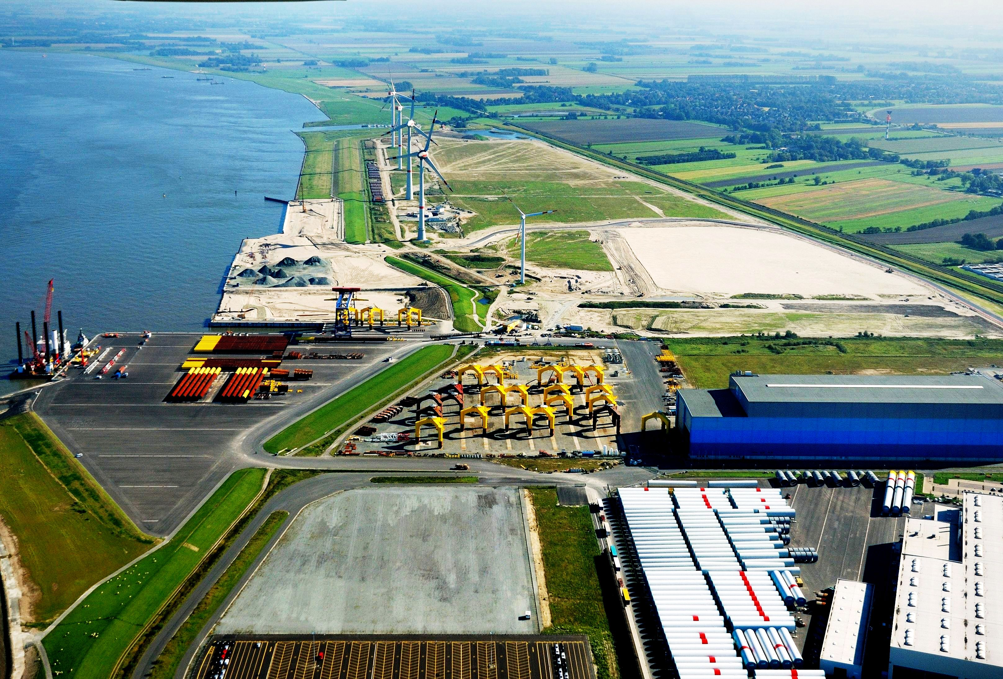 Luftbild mit WEA an der Elbe